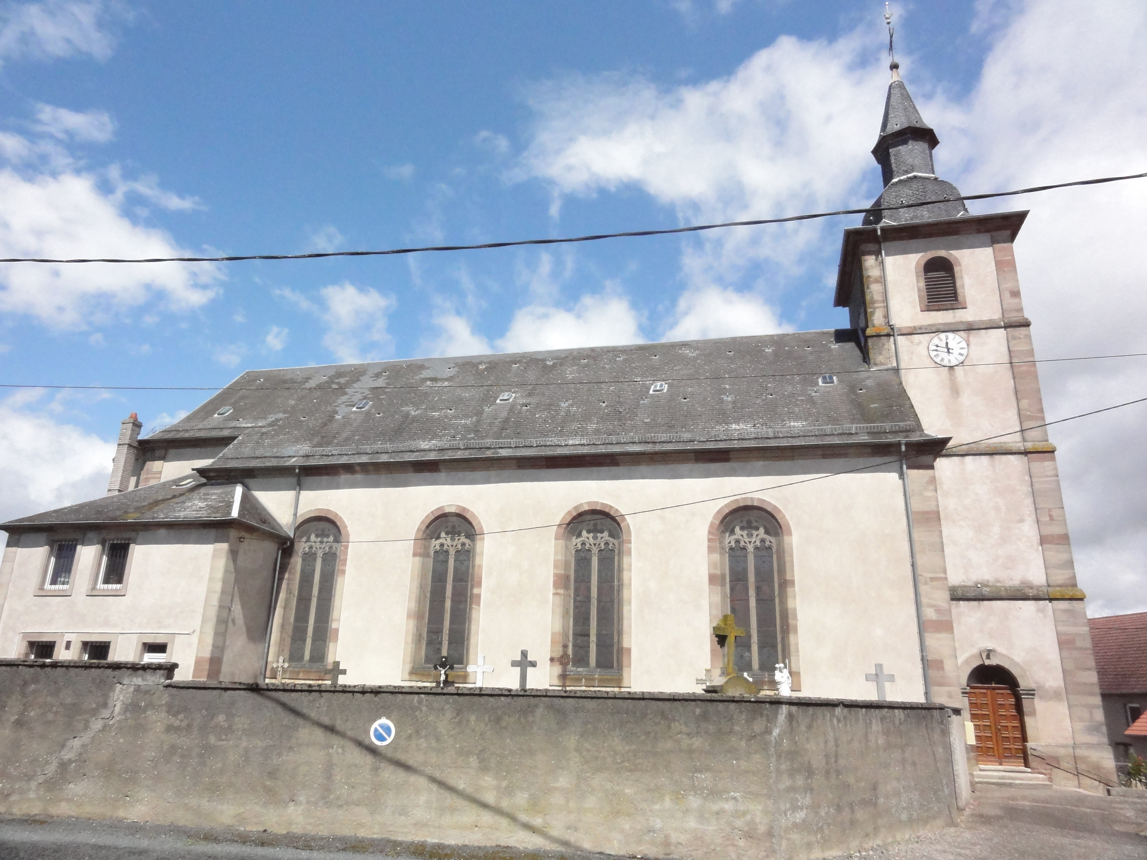 Brouviller (Moselle) église